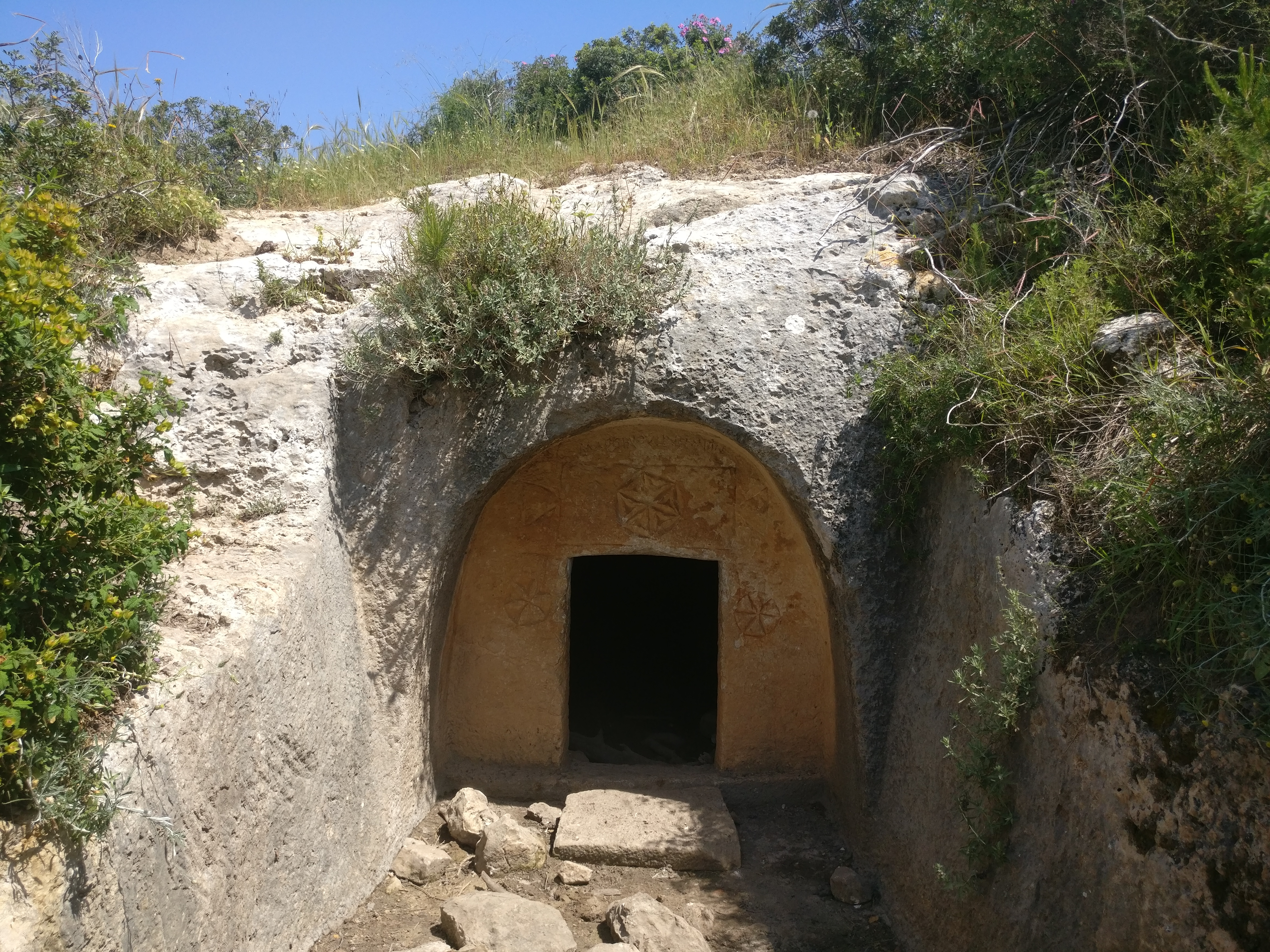 מערת קבורה בחורבת רקית שבכרמל